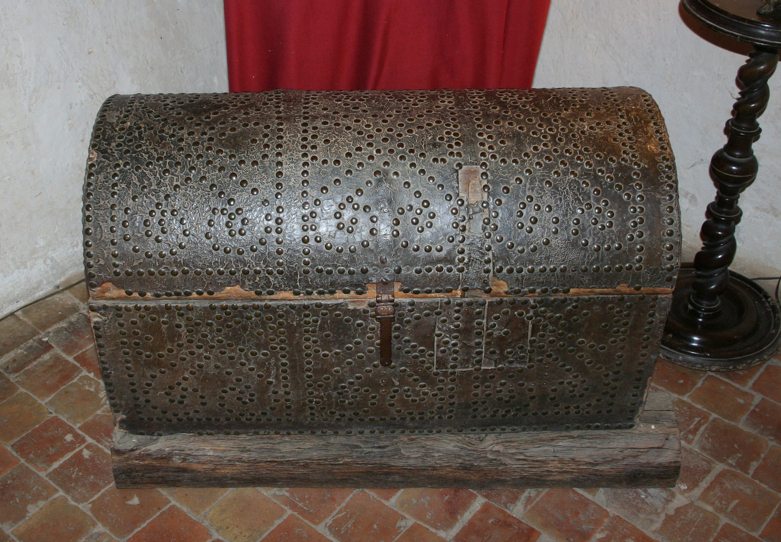 Coffre à bahut (couvercle bombé) du château de Montaigne dans lequel fut retrouvé en 1770 le manuscrit du Journal de voyage.